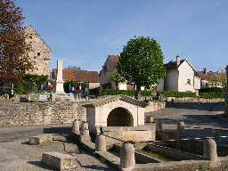 Place de Damparis (Jura) avec la fontaine et le monument aux morts Photo prise le 24 avril 2004 par Lucien PRADILLON 2004 Lucien PRADILLON